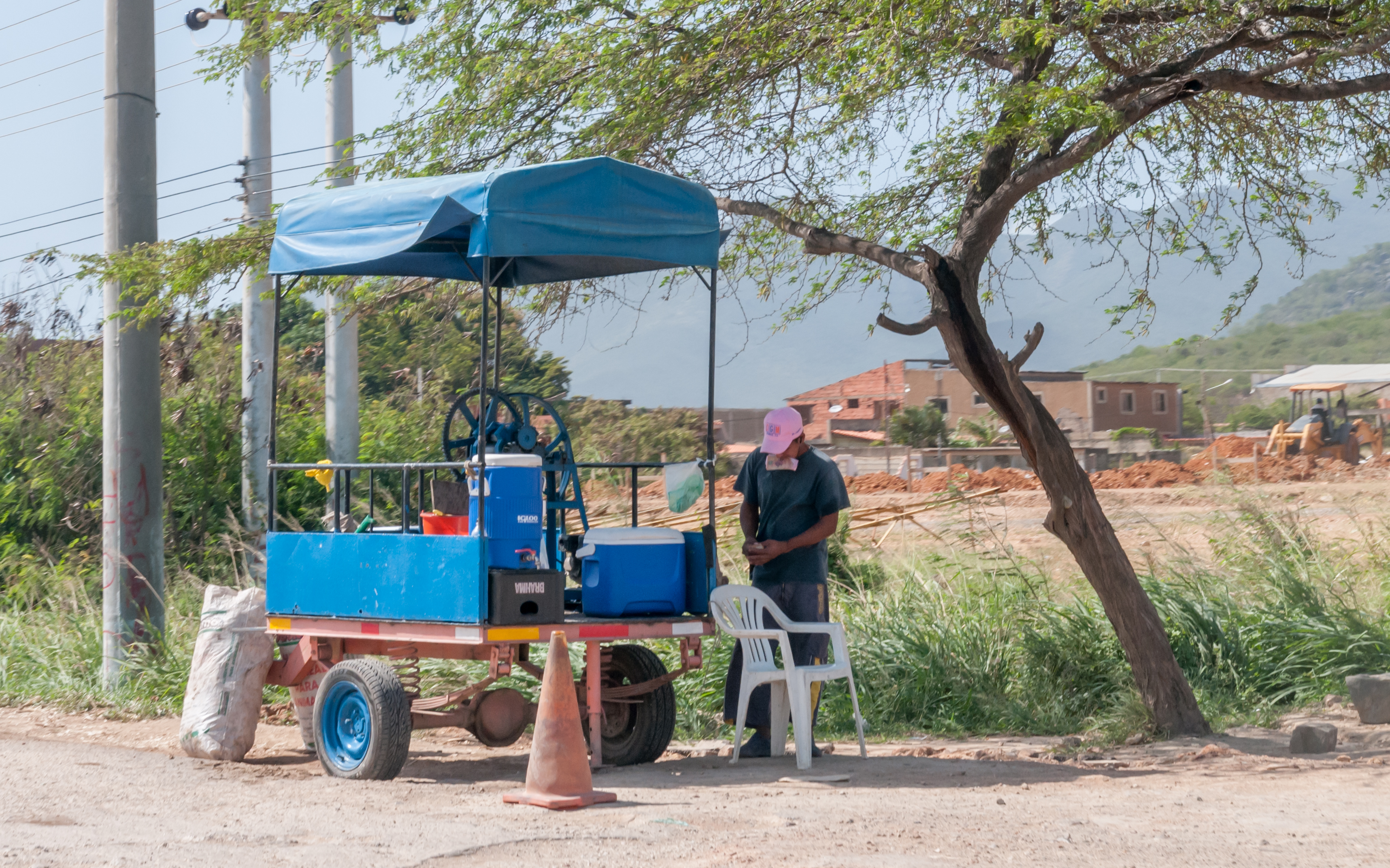 Vendedor de Papelón con limón